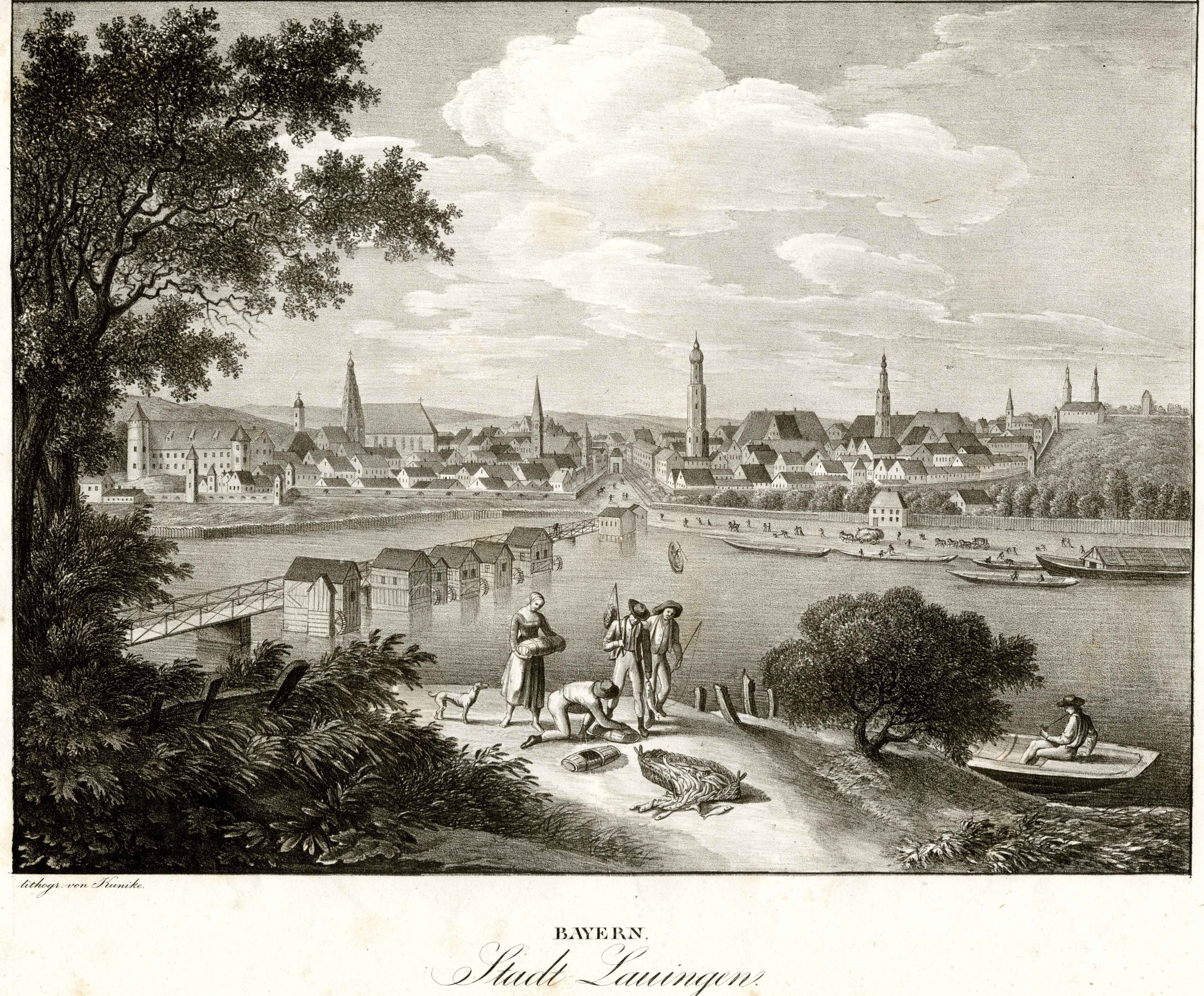 Stadt Lauingen - aus Lithographieserie: "Zwey hundert vier und sechzig Donau-Ansichten" ... "nach dem Laufe des Donaustromes von seinem Ursprunge bis zu seinem Ausflusse in das schwarze Meer". Gestochen und herausgegeben von Adolph Friedrich Kunike nach Vorlagen von Jakob Alt, Wien 1824-1826.